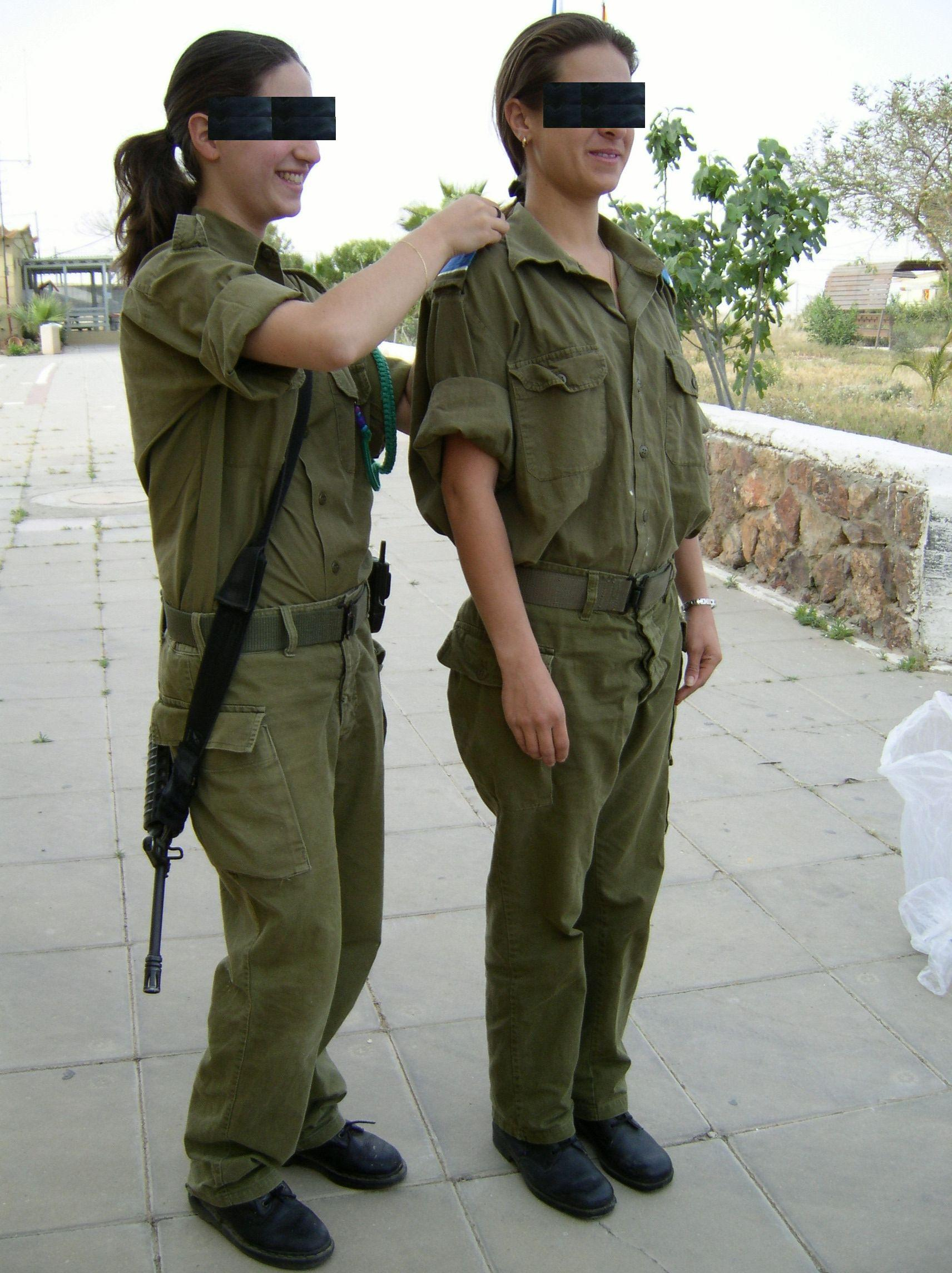 IDF personel